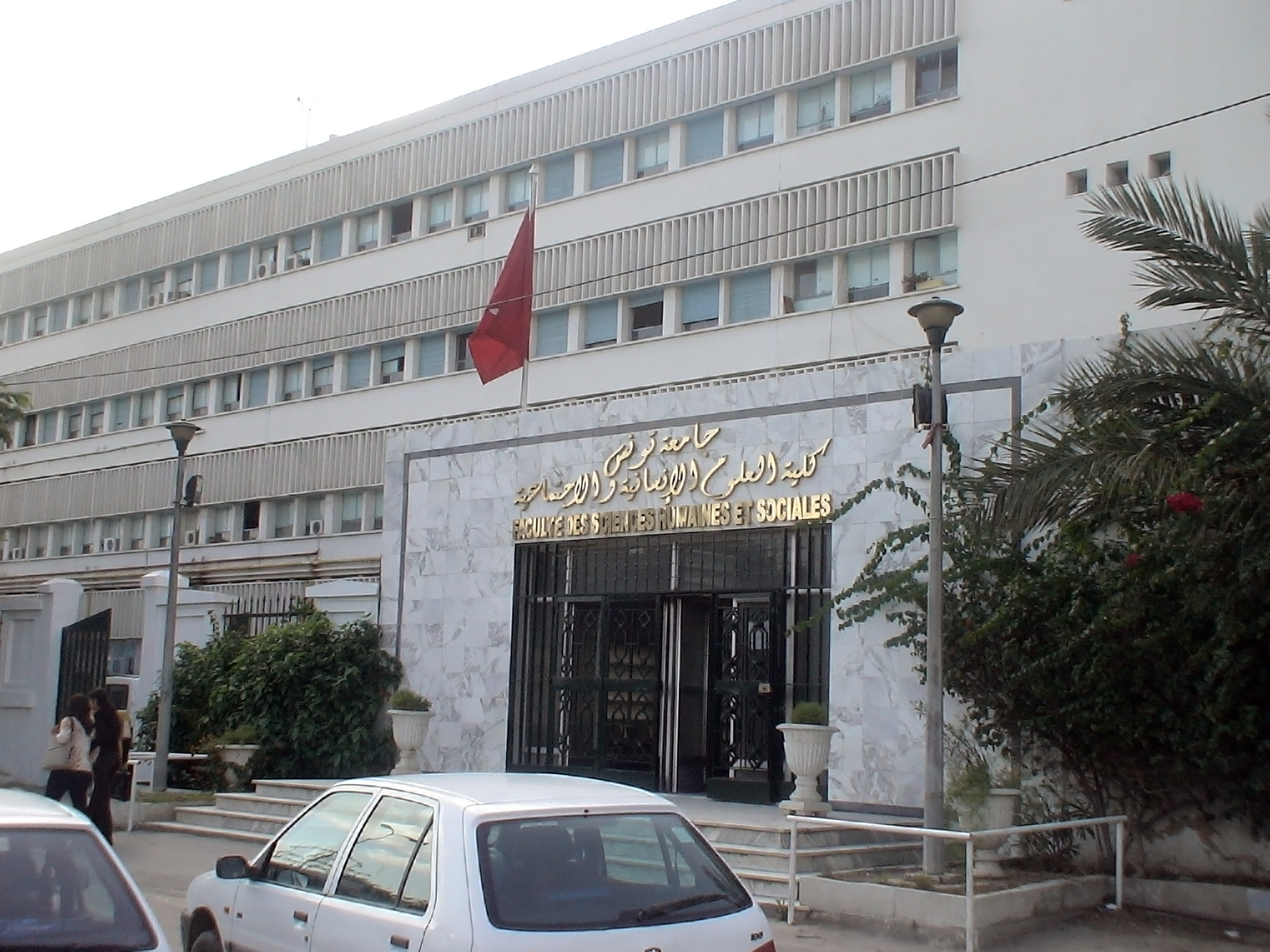 Entrée de la Faculté de Lettres 9 Avril à Tunis, intégrée à l'université de Tunis.